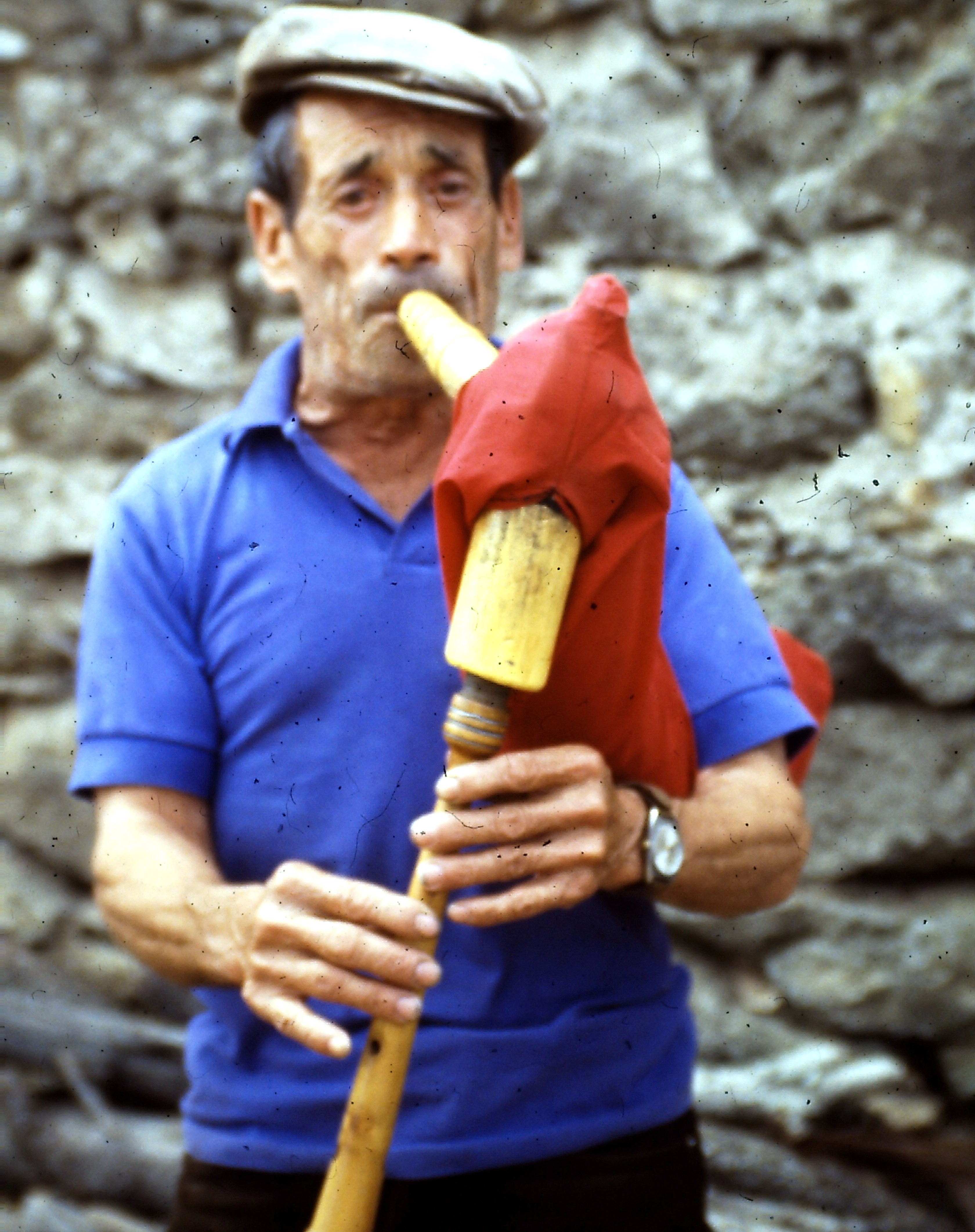 Pascoal